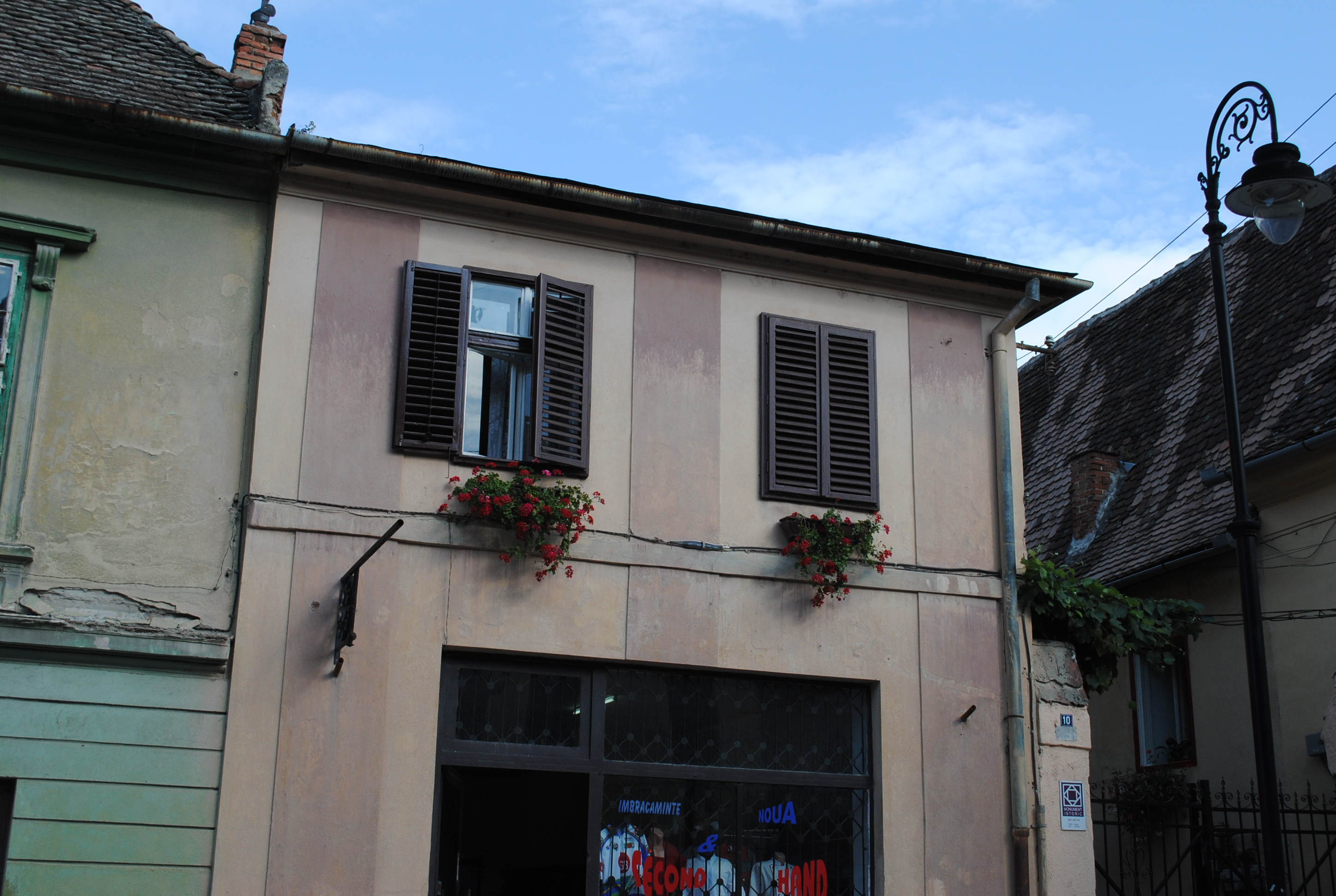 Casă, mijl. sec. XIX, sf. sec. XIX, 1925 - 1950